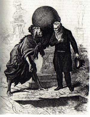 „Abschied vom Kosmos“ Stich Konrad Beckmanns nach Wilhelm von Kaulbach Veröffentlichung: September 1869, in: Die Gartenlaube, S. 654